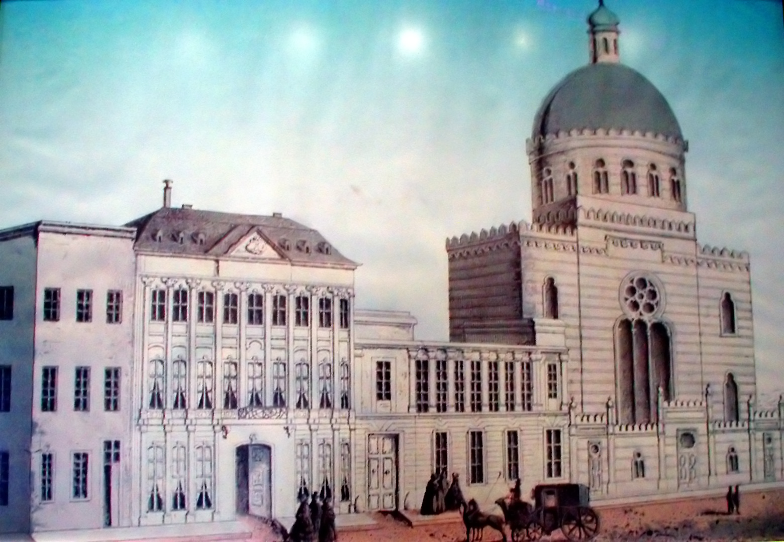 Köln, ehemaligen Synagoge Glockengasse